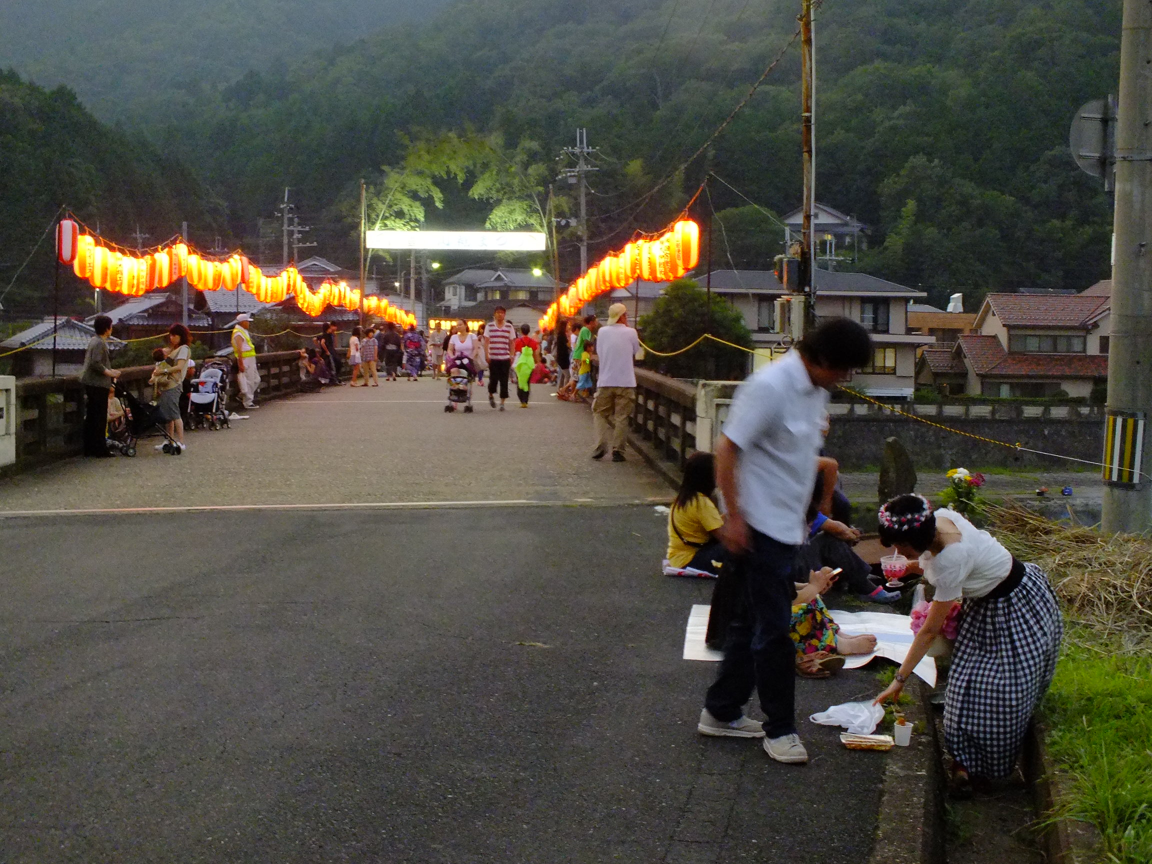 20140729 Ichijima-Kawasuso Matsuri 市島川裾祭（丹波市市島町）竹田川